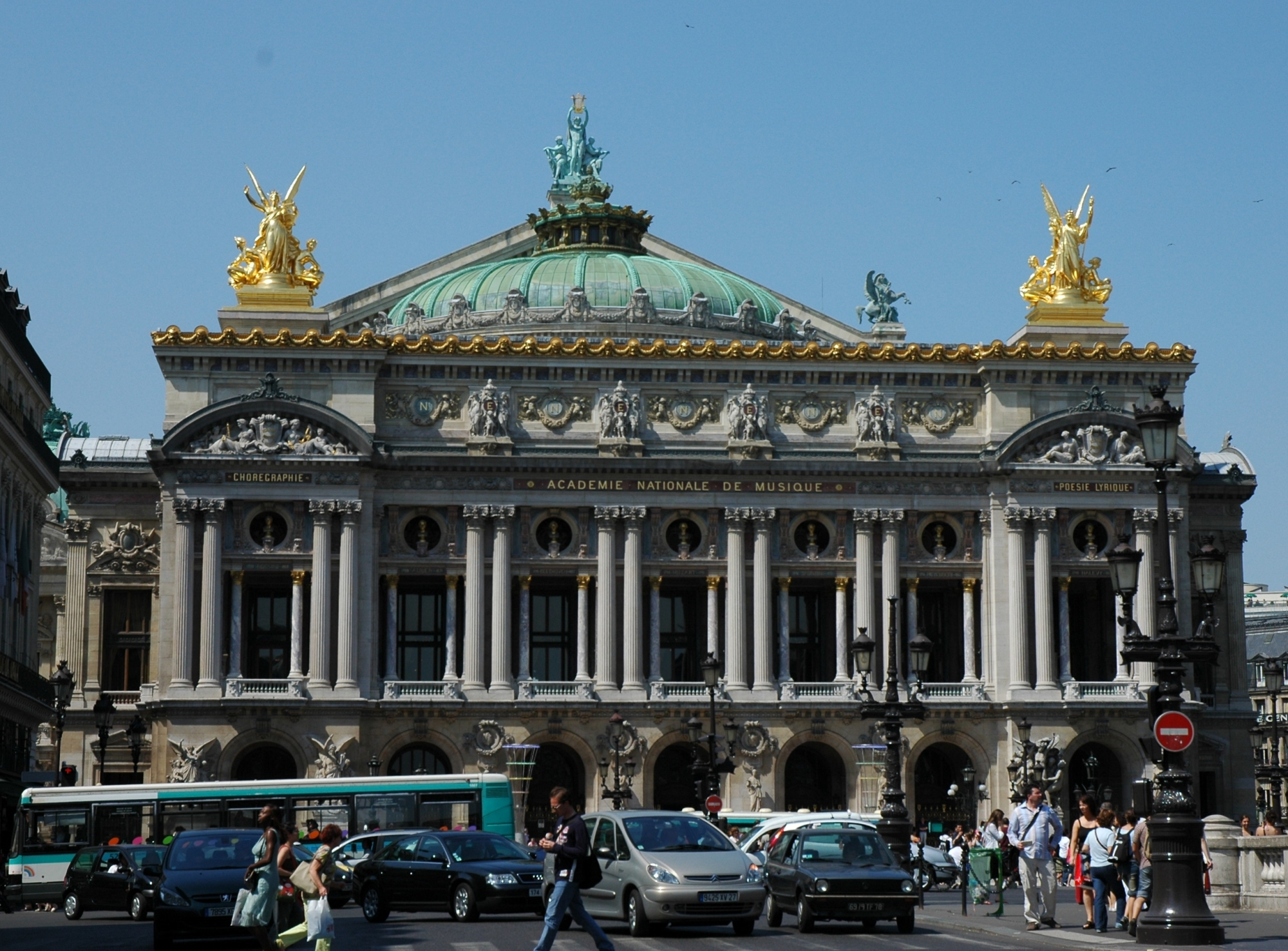 Palais Garnier (Opéra de Paris), view from the Avenue de l'Opéra, Paris (France). Architect: Charles Garnier